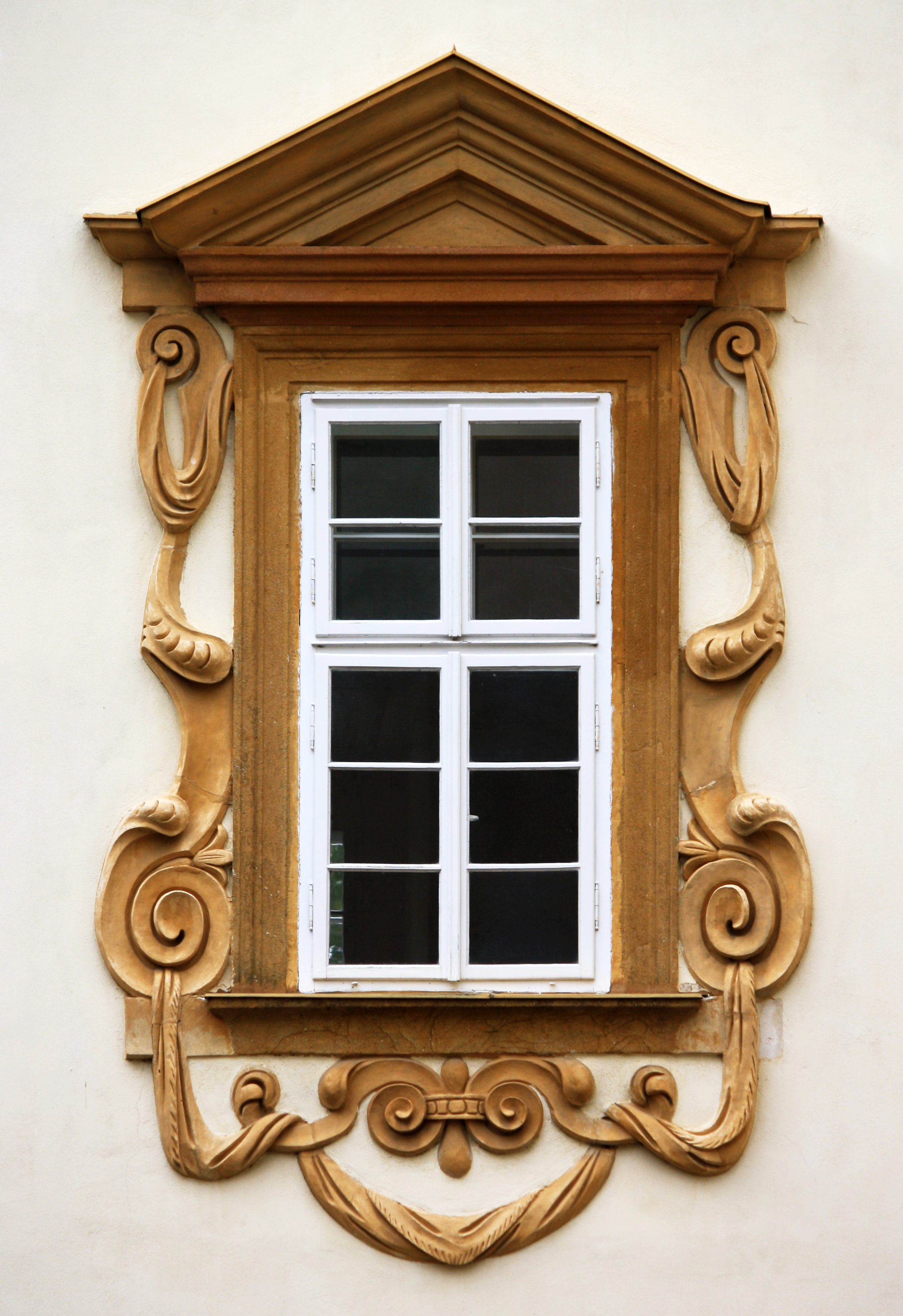 Zámek Lemberk